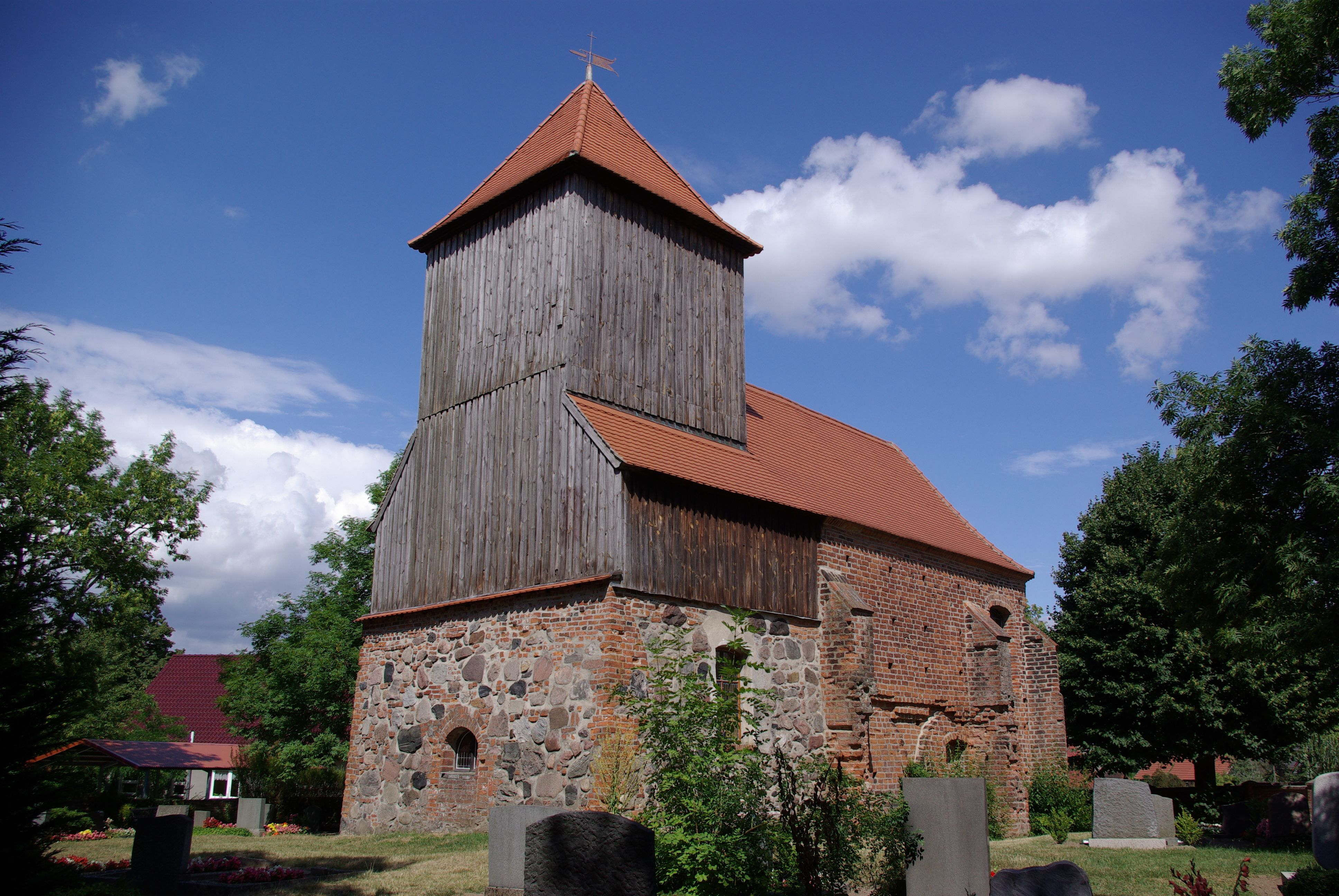 Kotzen in Brandenburg. Die Kirche im Ortsteil Kotzen steht unter Denkmalschutz. Die Kirche stammt aus dem 13. Jahrhundert.